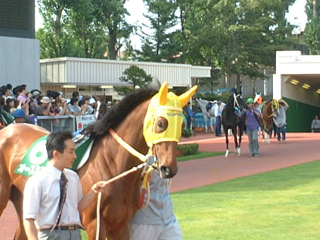 オースミハルカ 札幌競馬場パドックにて撮影